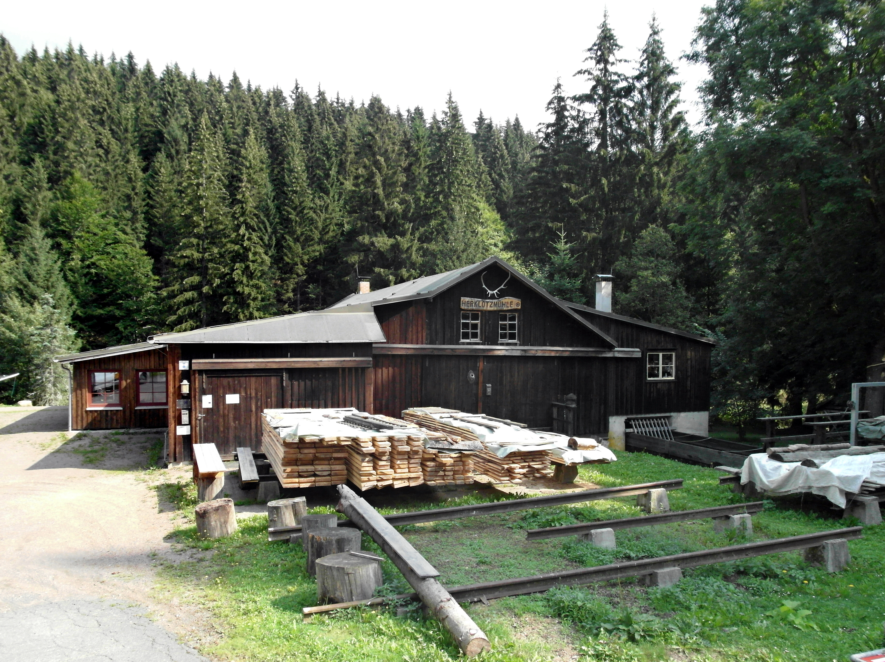 06.09.2018 01776 Seyde (Hermsdorf), Rehefelder Straße 1: Herklotzmühle. Die Wassermühle (GMP: 50.754487,13.677588) an der Wilden Weißeritz existiert wahrscheinlich schon seit 1446. Bis 1992 wurde sie als Sägewerk betrieben. Seit 2003 wird sie in Regie des Förderverein Herklotzmühle e.V. als Sägewerksmuseum erhalten und saniert. Sicht von Südwesten. [SAM7285.JPG]20180906100DR.JPG(c)Blobelt